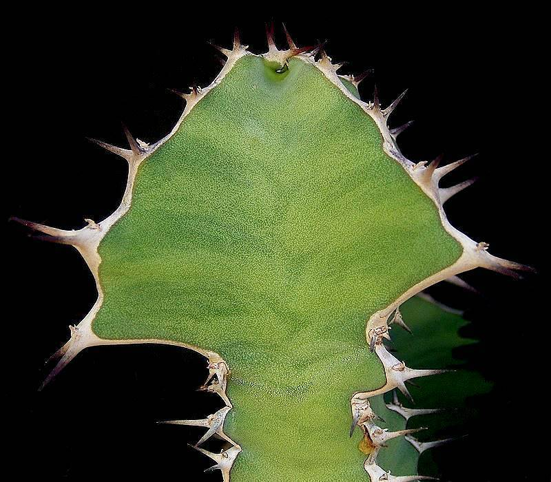 Euphorbia semperflorens